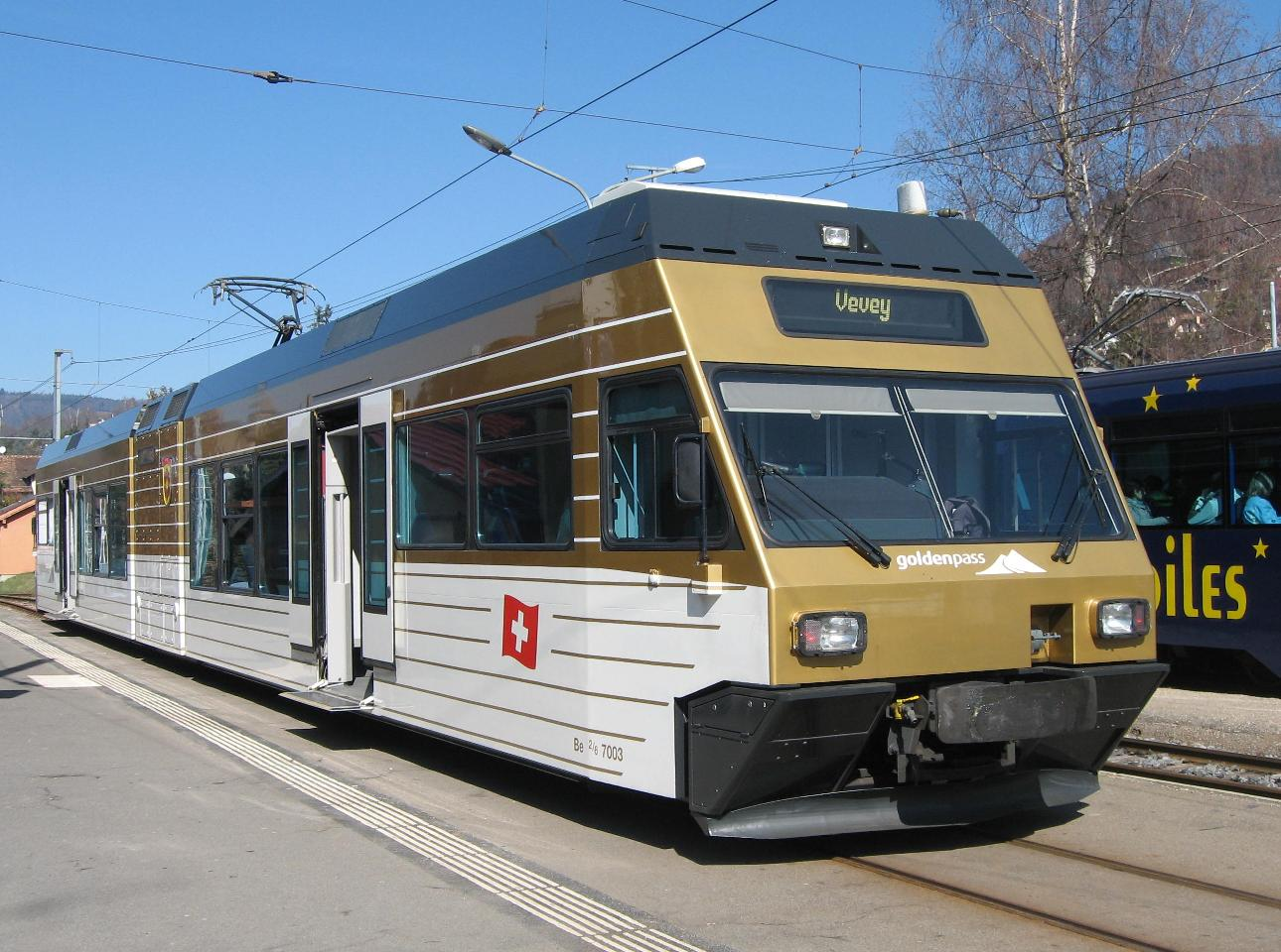 Gelenktriebwagen (GTW) BDe 2/6 7003 Blonay der Montreux–Berner Oberland-Bahn (MOB), Geschäftsbezeichnung Goldenpass, beim Bahnhof Blonay im März 2012.